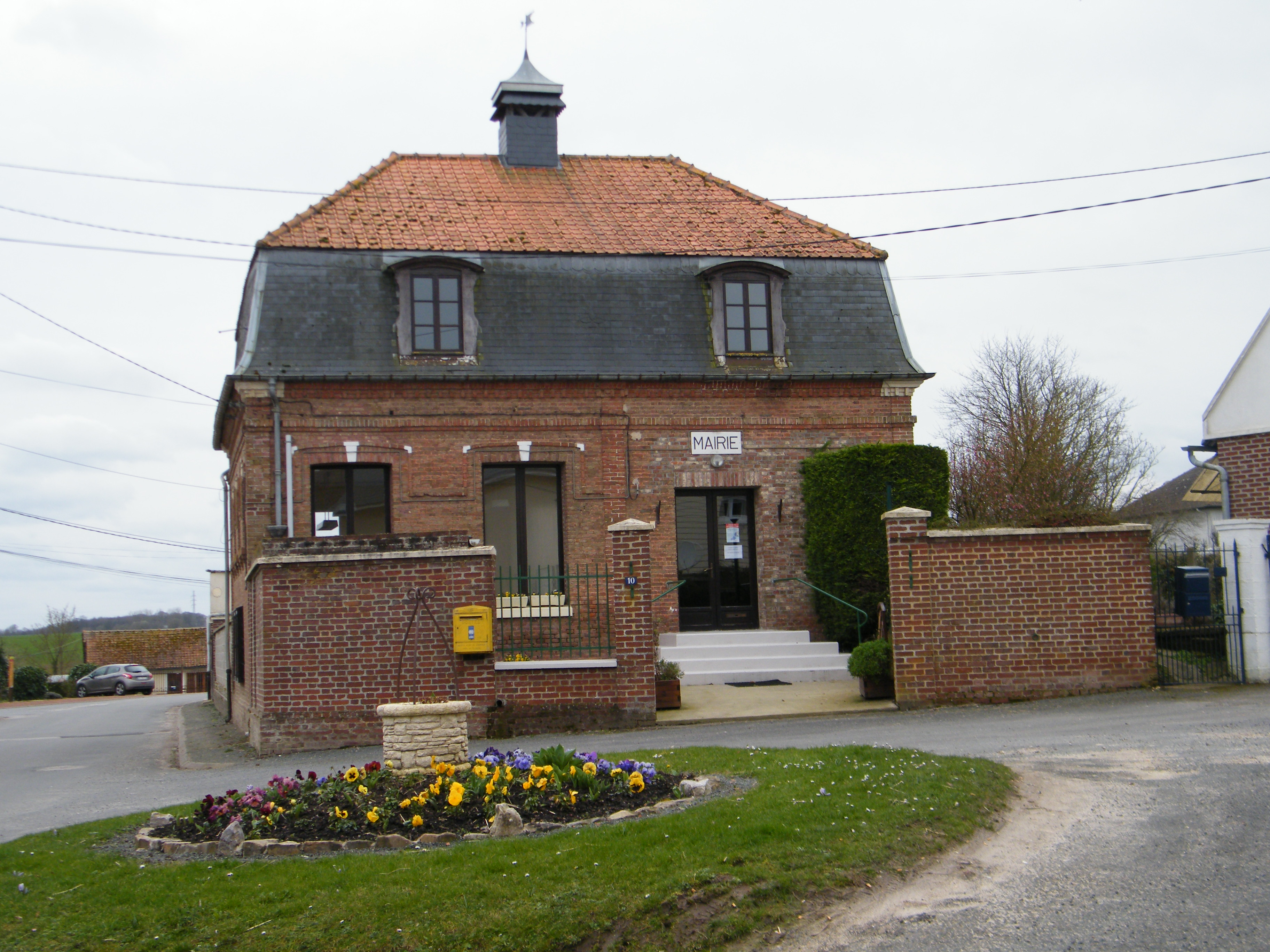 La mairie.